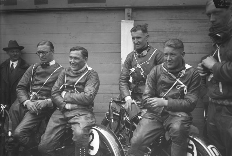 Ernst Henne, Weltrecordmann im Motorradfahren! Der bekannte Motorradfahrer Ernst Henne stellte mit einer 750 ccm. BMW-Compressor-Maschine eine Stundengeschwindigkeit von 221,539 km auf. (Köppen, Bauhofer, Henne, Ecker (v.l.n.r.)